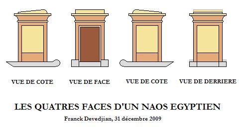 Description Les 4 faces d'un naos égyptien Date31 December 2009Sourceordinateur personnel de Franck DevedjianAuthorFranck Devedjian, né le 12 août 1981 à Clamart (France) mail : franckdevedjian(at)hotmail(pt)com Les 4 faces d'un naos égyptien